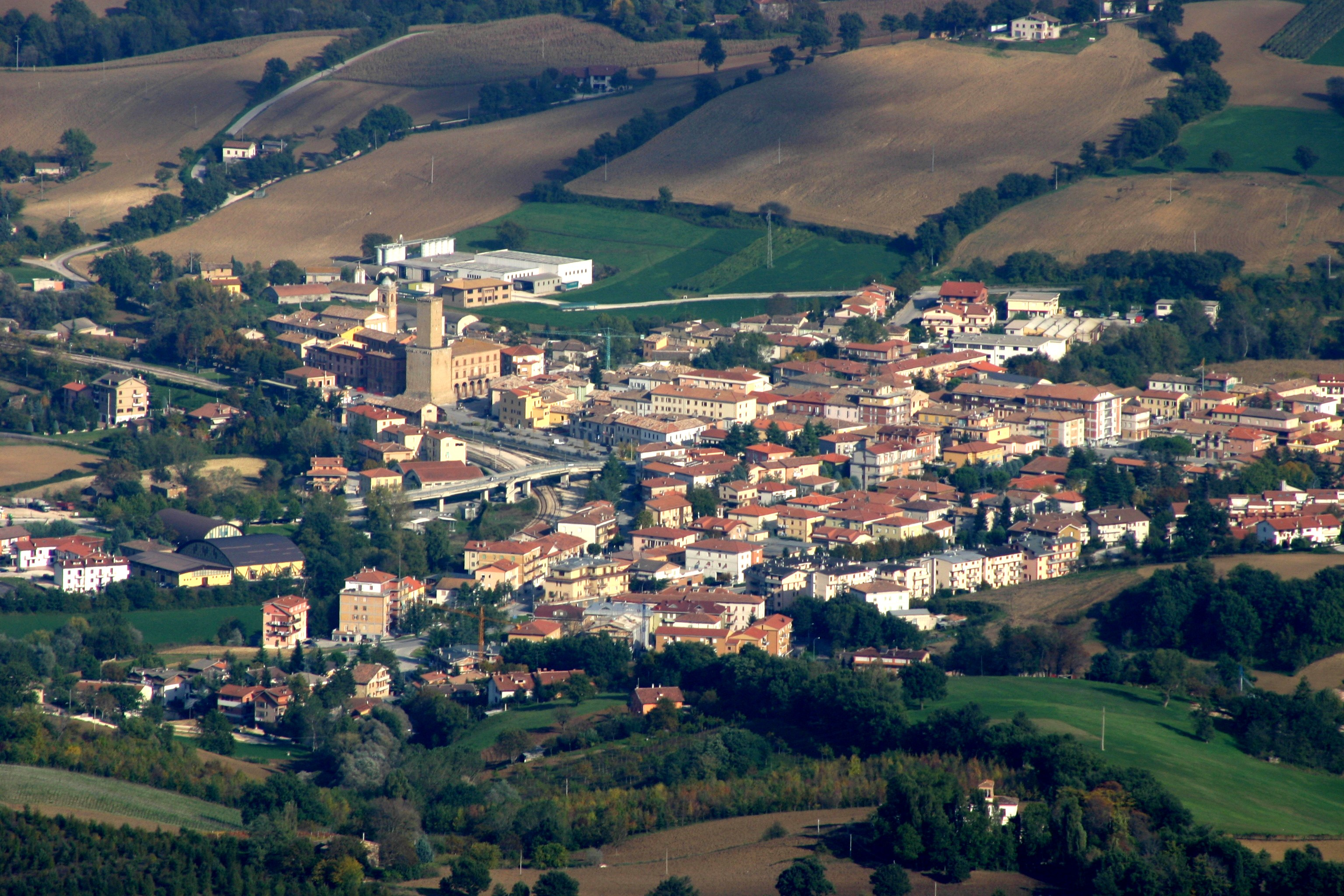 Vista di Castelraimondo dalla vetta di Monte Gemmo